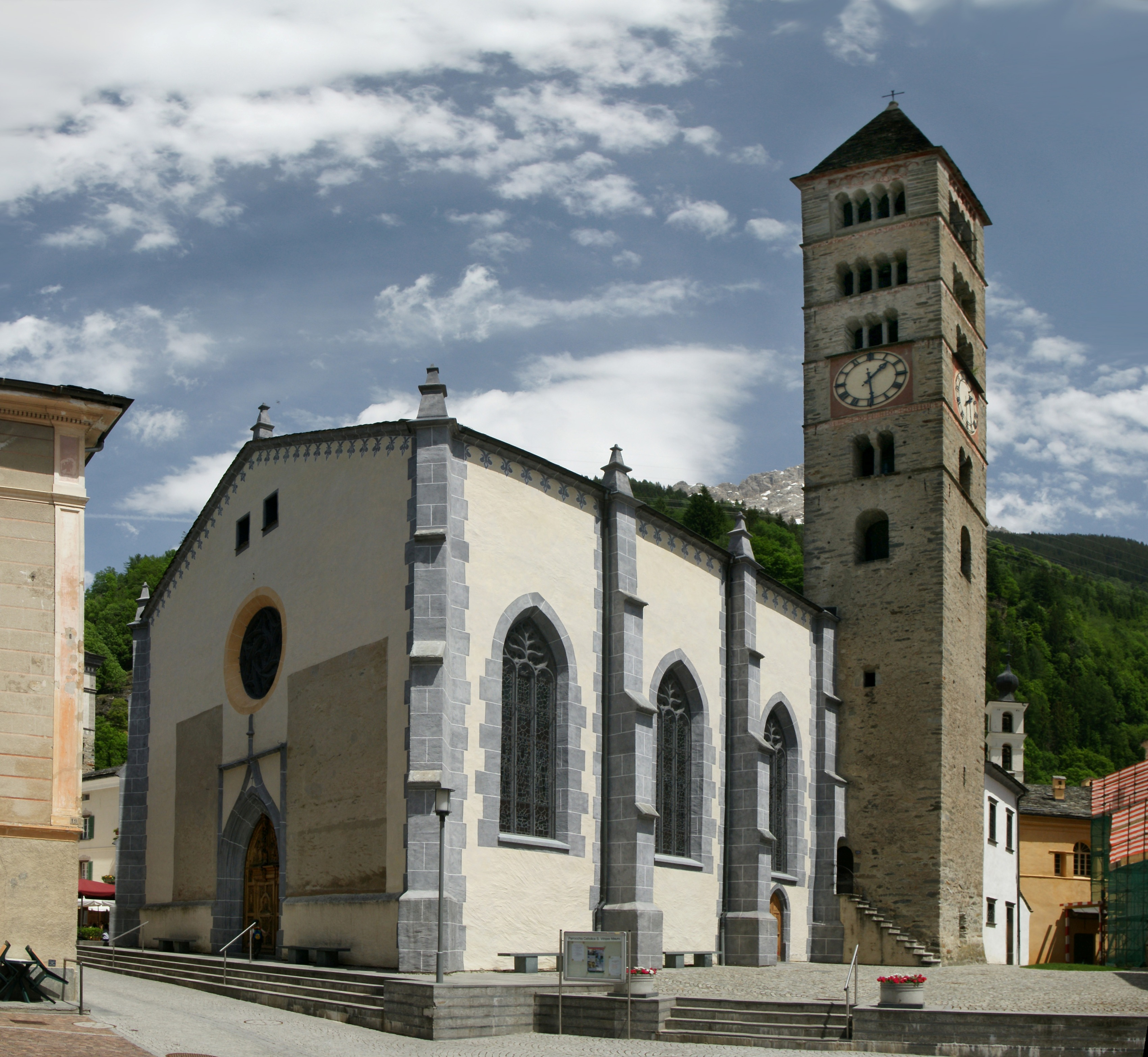 San Vittore Mauro. Poschiavo (deutsch/rätoromanisch Puschlav) ist eine politische Gemeinde im südlichen Graubünden (Schweiz). Zusammen mit der Nachbargemeinde Brusio bildet Poschiavo die Talschaft Valposchiavo (deutsch: Puschlav) und den Bezirk Bernina.